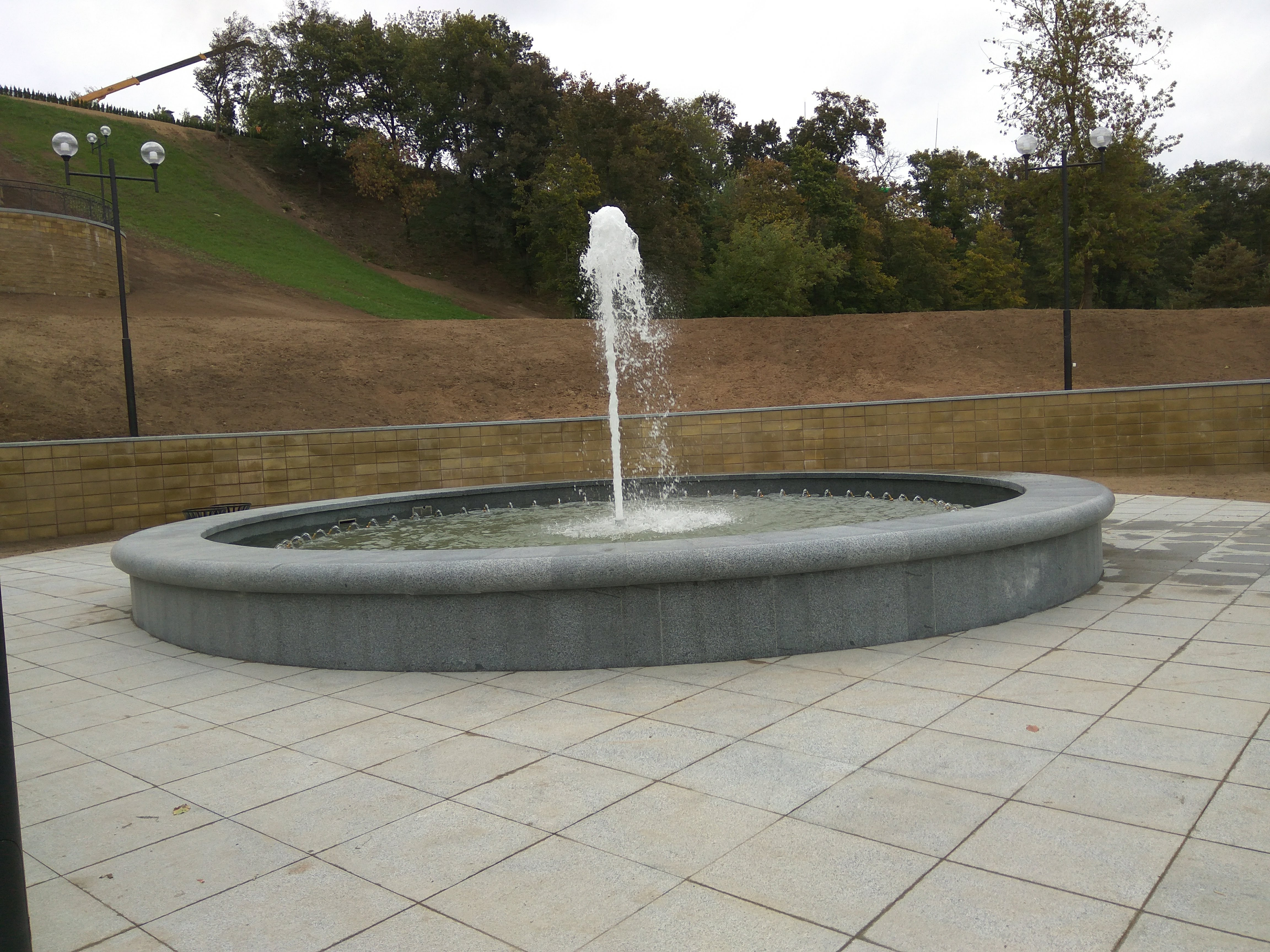 Магілёў. Лесвіца ў Падміколле